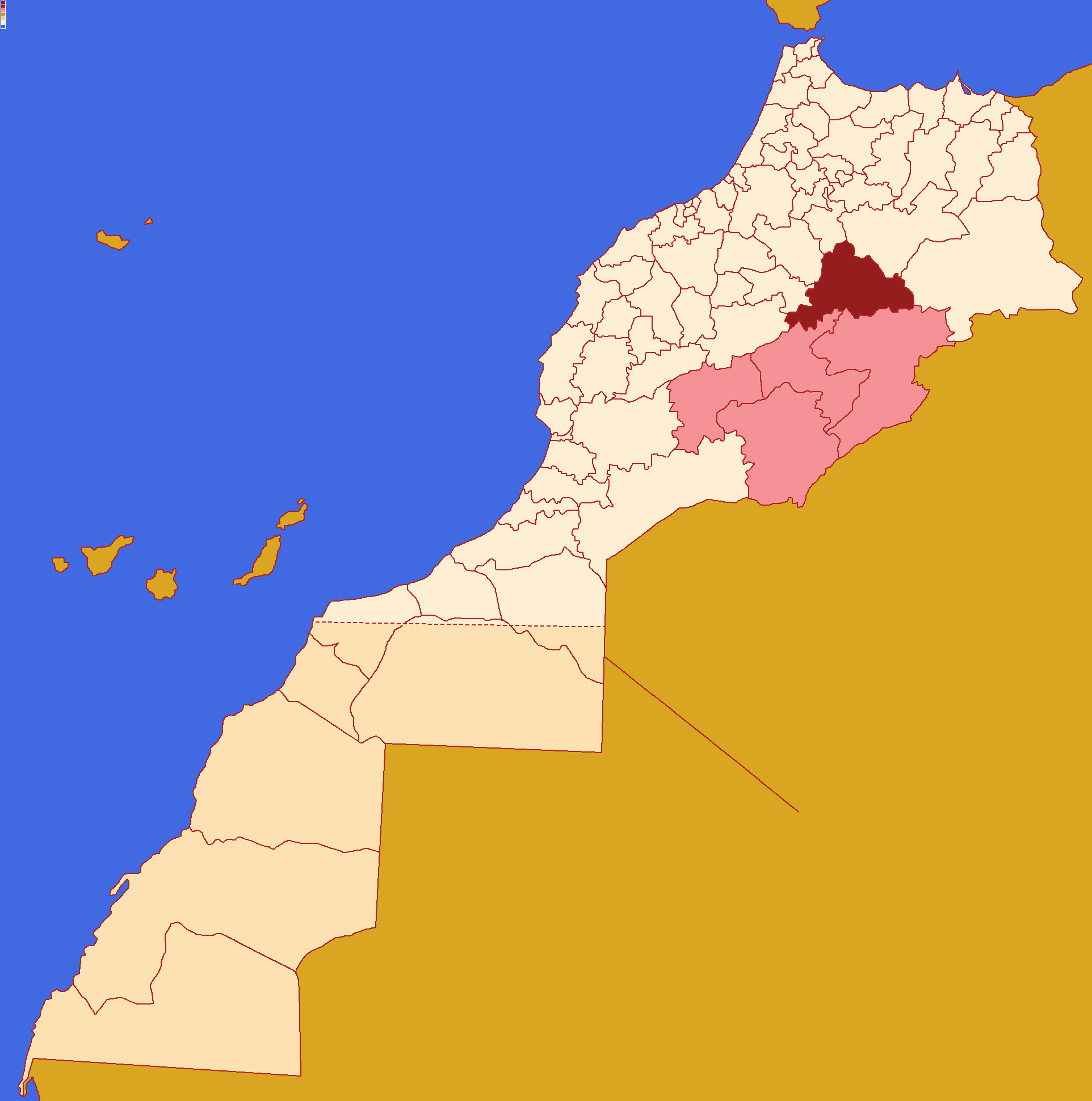 Localização da província de Midelt ,dentro da região de Drá-Tafilete, dentro de Marrocos. Conforme a reforma admistrativa de 2015.